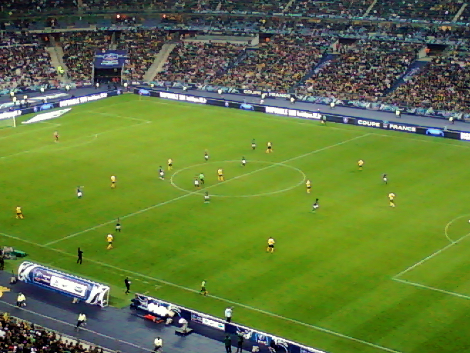 Match Quevilly - Lyon (0-1), finale de la Coupe de France 2012 au Stade de France le 28 avril 2012